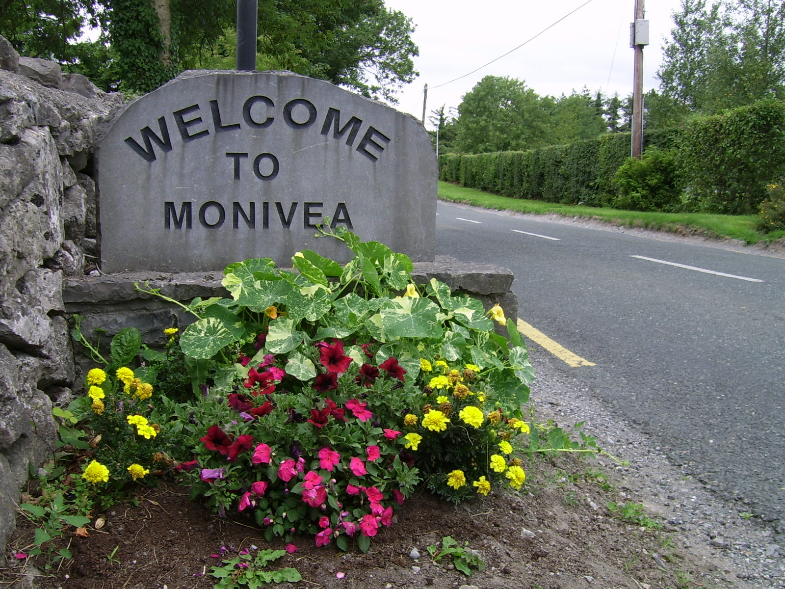 Welcome to Monivea